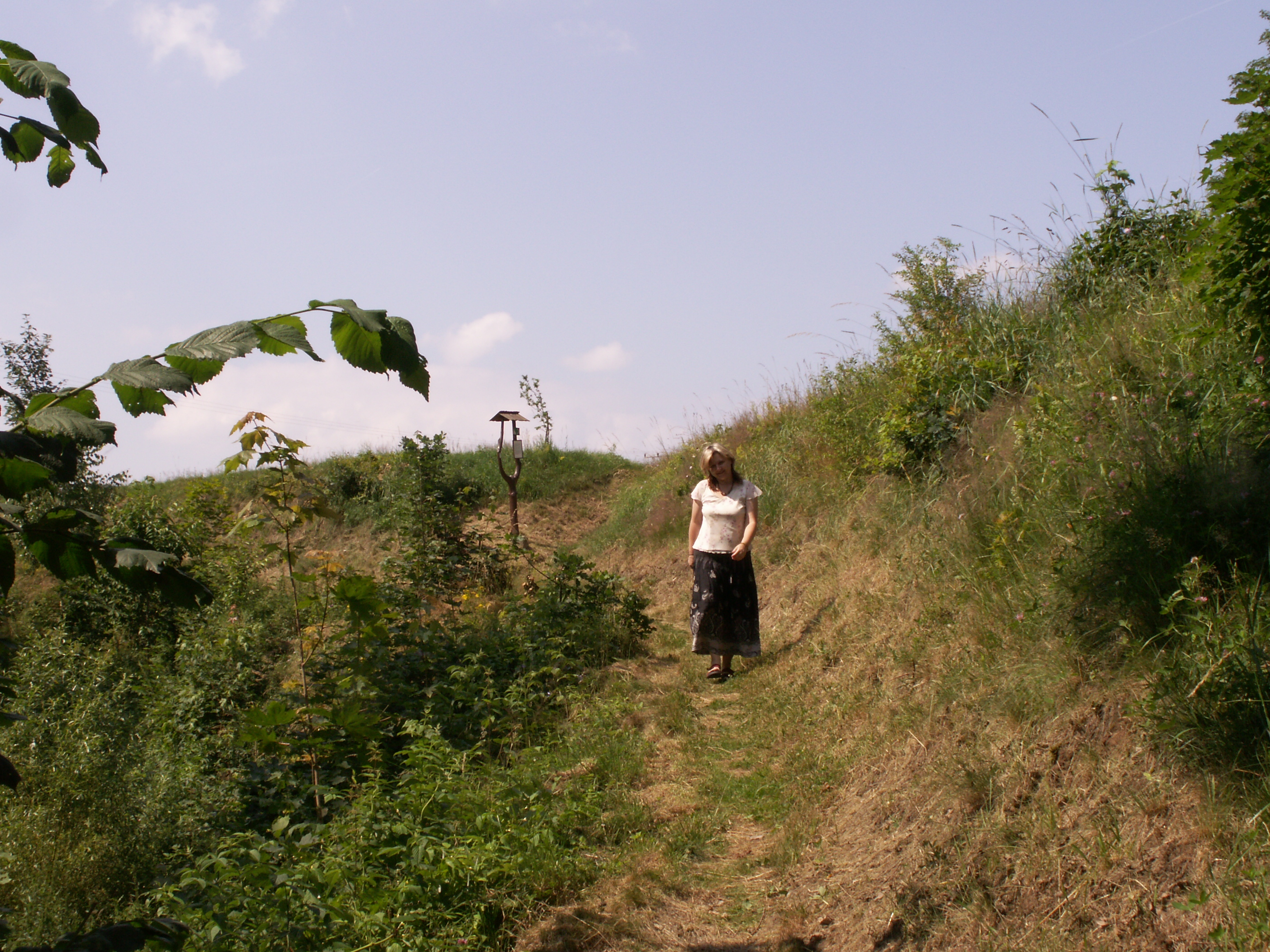 Polná, okres Jihlava, klešter - středověká technická památka